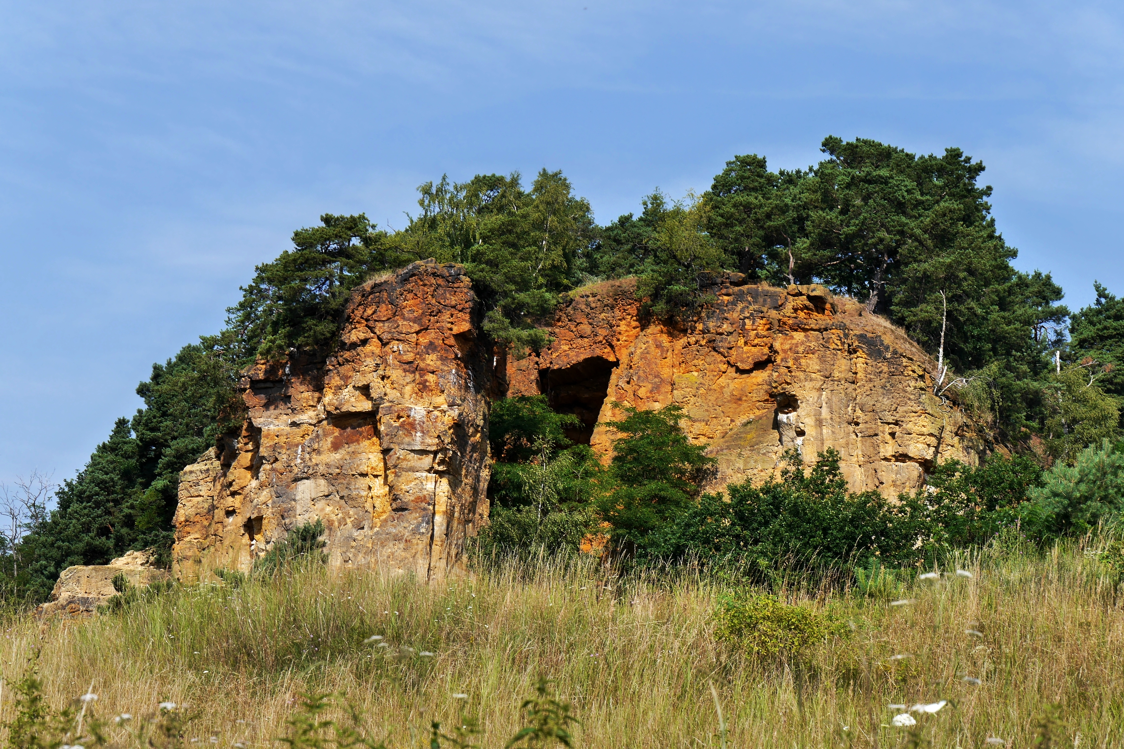 Lehof-Felsen nördlich von Quedlinburg, Sachsen-Anhalt